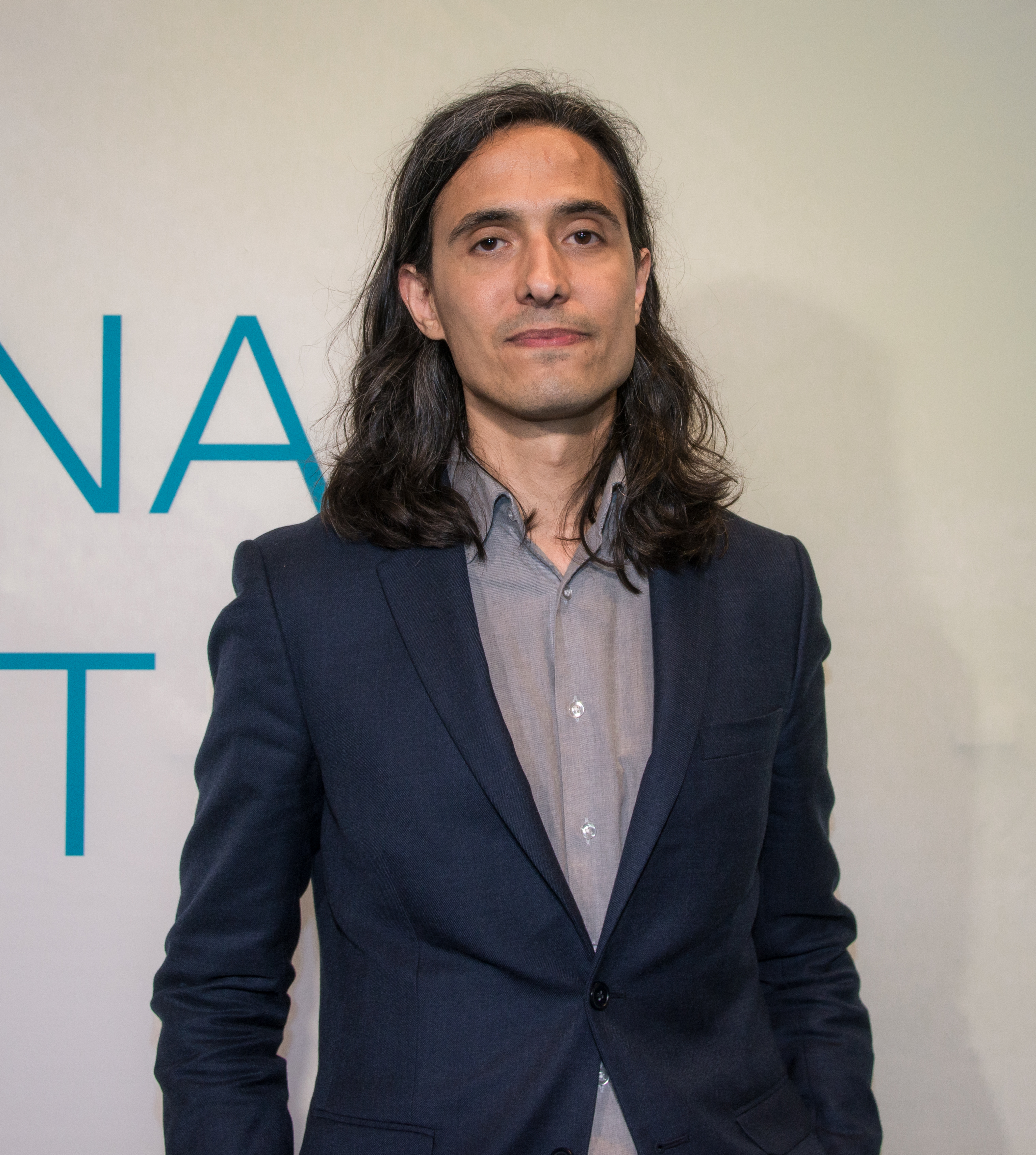 Jonas Hassen Khemiri, Sommarvärd i P1, på röda mattan på väg in i Berwaldhallen i Stockholm den 13 juni 2019.